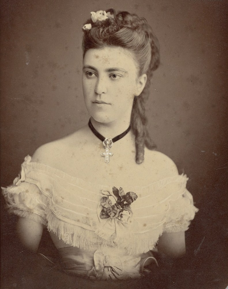 Мэри Адлерберг. светлейшая княгиня Мингрельская Мария Александровна, урождённая графиня Адлерберг